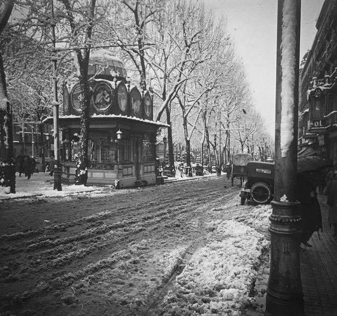 Les Rambles de Barcelona sota els efectes de la nevada del 27 de febrer de 1924 .